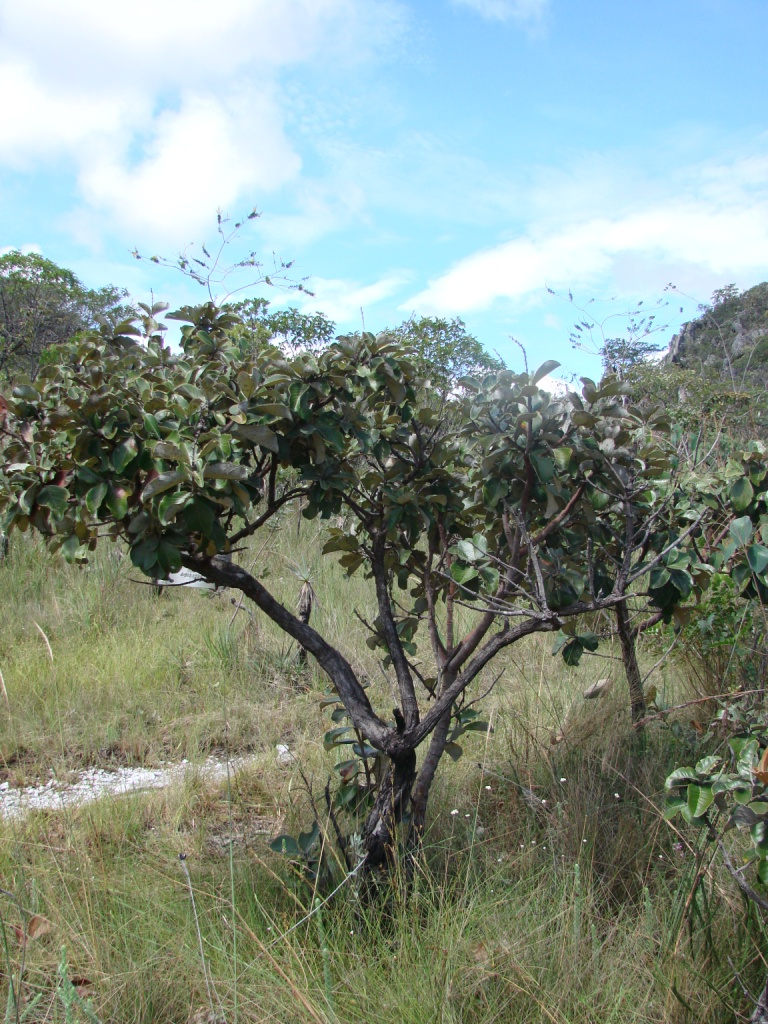 Byrsonima crassa, Malpighiaceae - Brasilien/Brasil: Goiás, Cavalcante